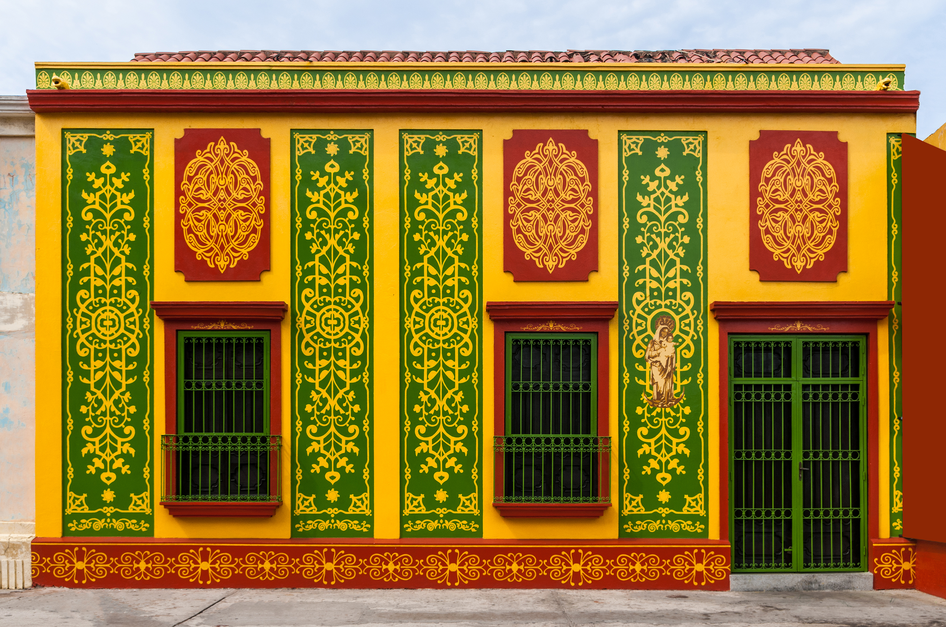 Casa Colonial del Centro Historico de Maracaibo